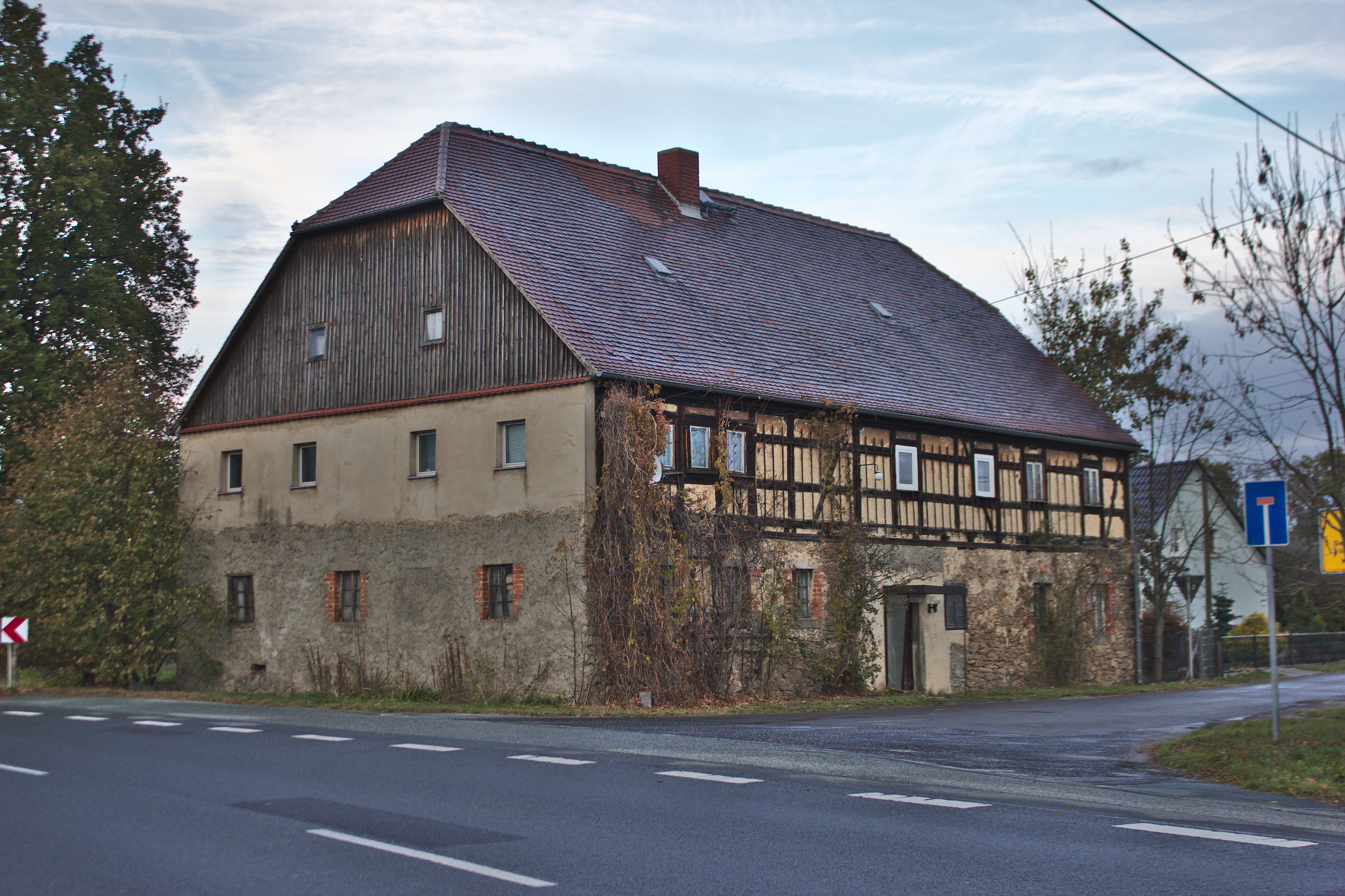 Hornjoserbsce: Něhdyši hosćenc w Holešowje (kulturny pomnik)